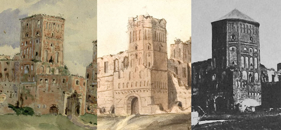 Беларуская (тарашкевіца): Вельмі цікавае параўнаньне двух малюнкаў, якія былі зробленыя з натуры мастакамі К. Русецкім і Н. Ордай, а таксама выгляду вежы Мірскага замку на фатаздымку канца XIX стагоддзя. Відавочна, што Орда назнарок зьмяняе выгляд вежы, зацірае кансерватарскі дах (які ўжо накрываў вежу) і "сачыняе" руініраваныя сьцены.